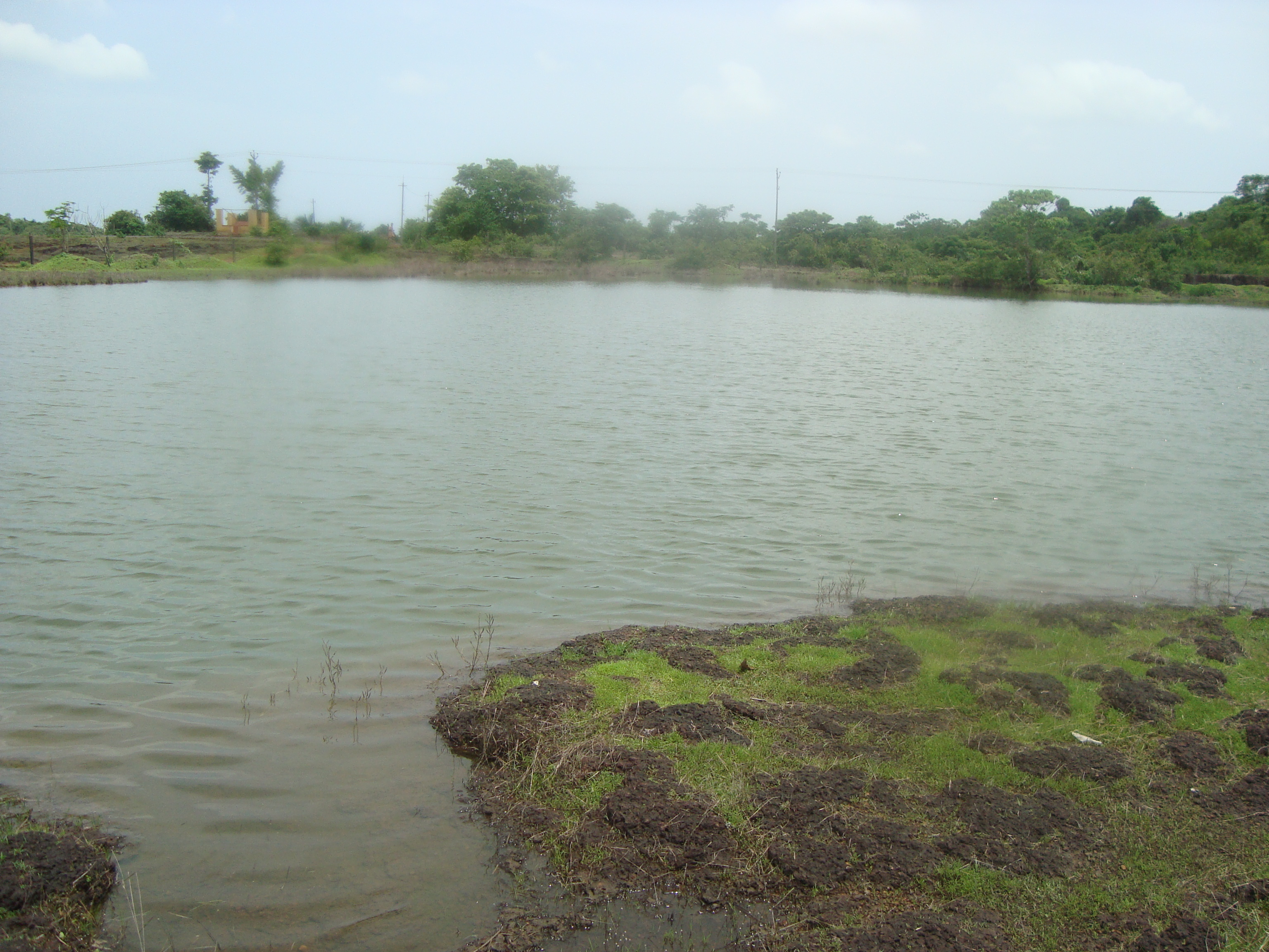 അടുക്കത്ത് അമ്പലത്തിലെ ആമക്കുളം.